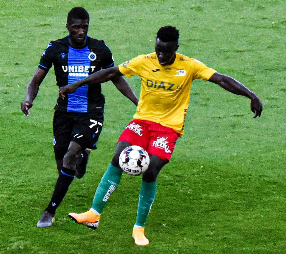 FJRS